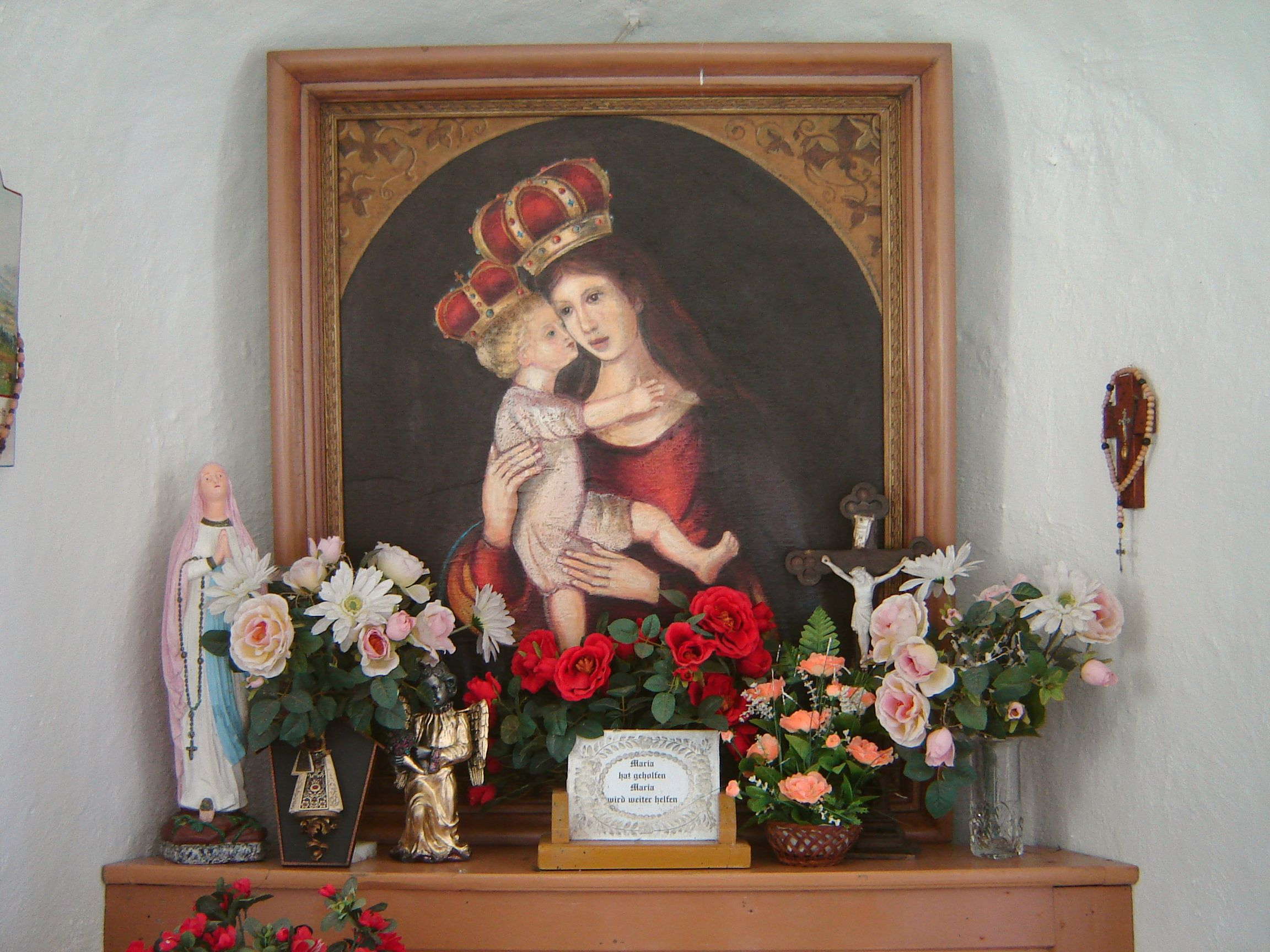 Feldkappelle Innenansicht